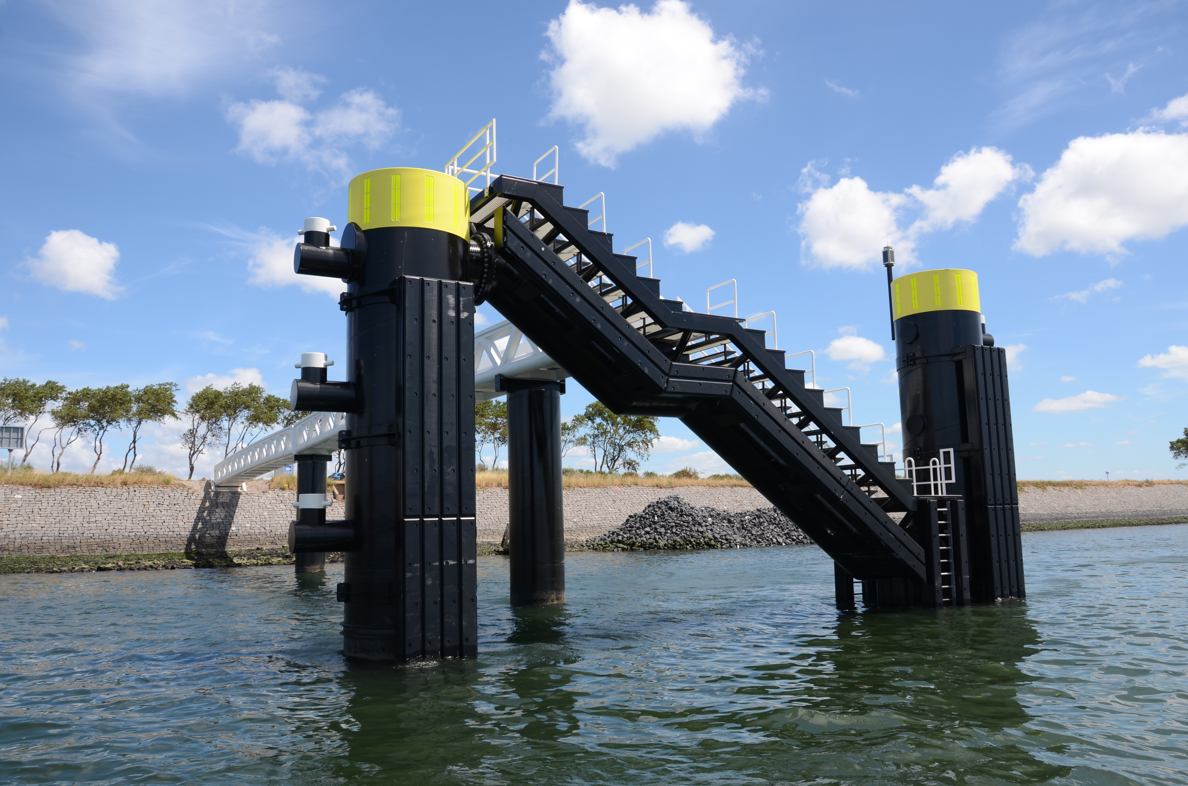 Een pianotrap als veilige afstap voor de binnenvaart in het Calandkanaal